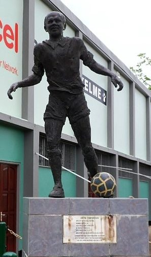 Andre Kamperveen standbeeld voor het kantoor van de Surinaamse Voetbalbond aan de Letitia Vriesdelaan 7 in Paramaribo